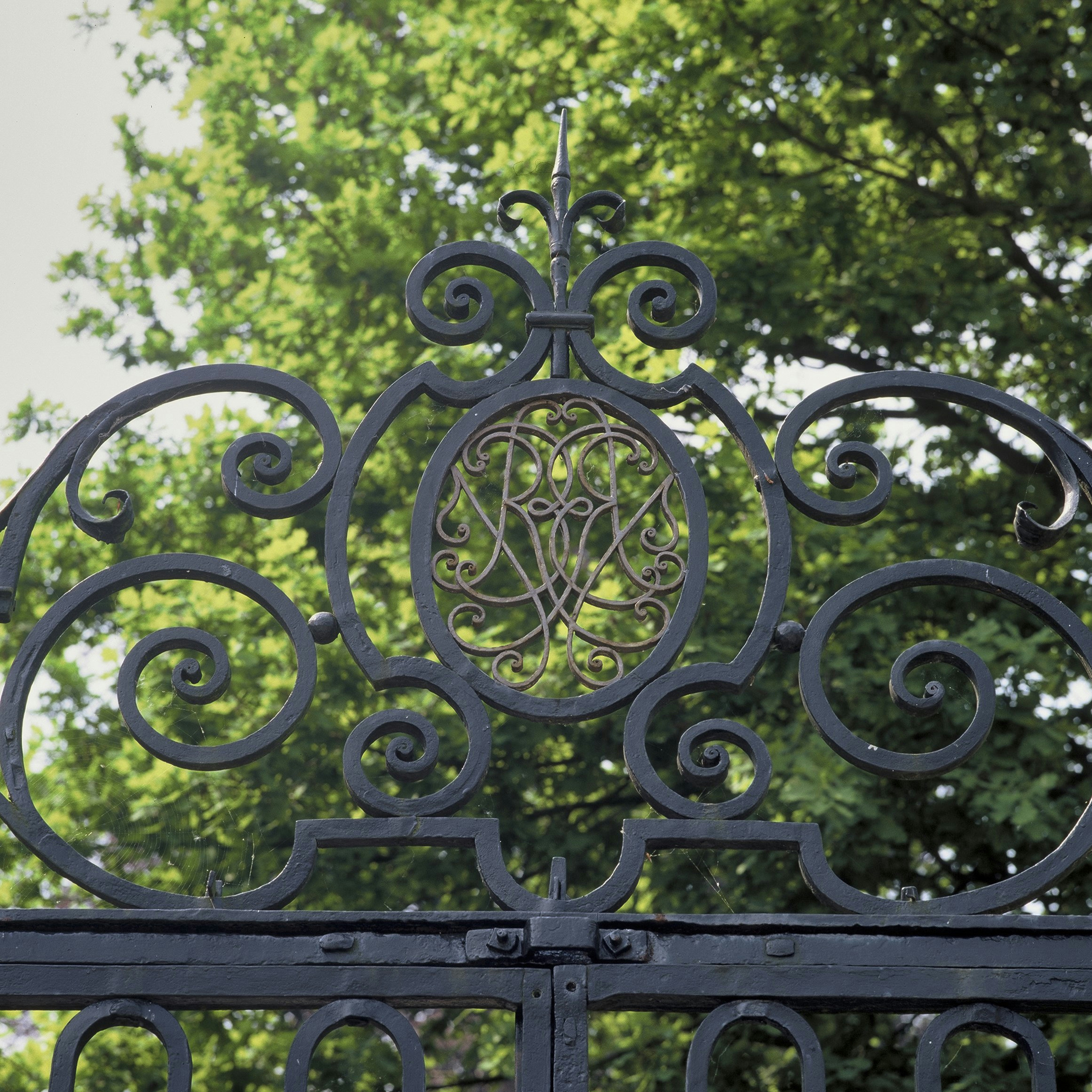 Kasteel De Cannenburgh: Detail, hekwerk met initialen van Frederik Johan van Isendoorn à Blois en Anna Margaretha van Renesse van Elderen (opmerking: Gefotografeerd voor het boek "Geldersche Kasteelen" door J.C. Bierens de Haan en J.R. Jas)